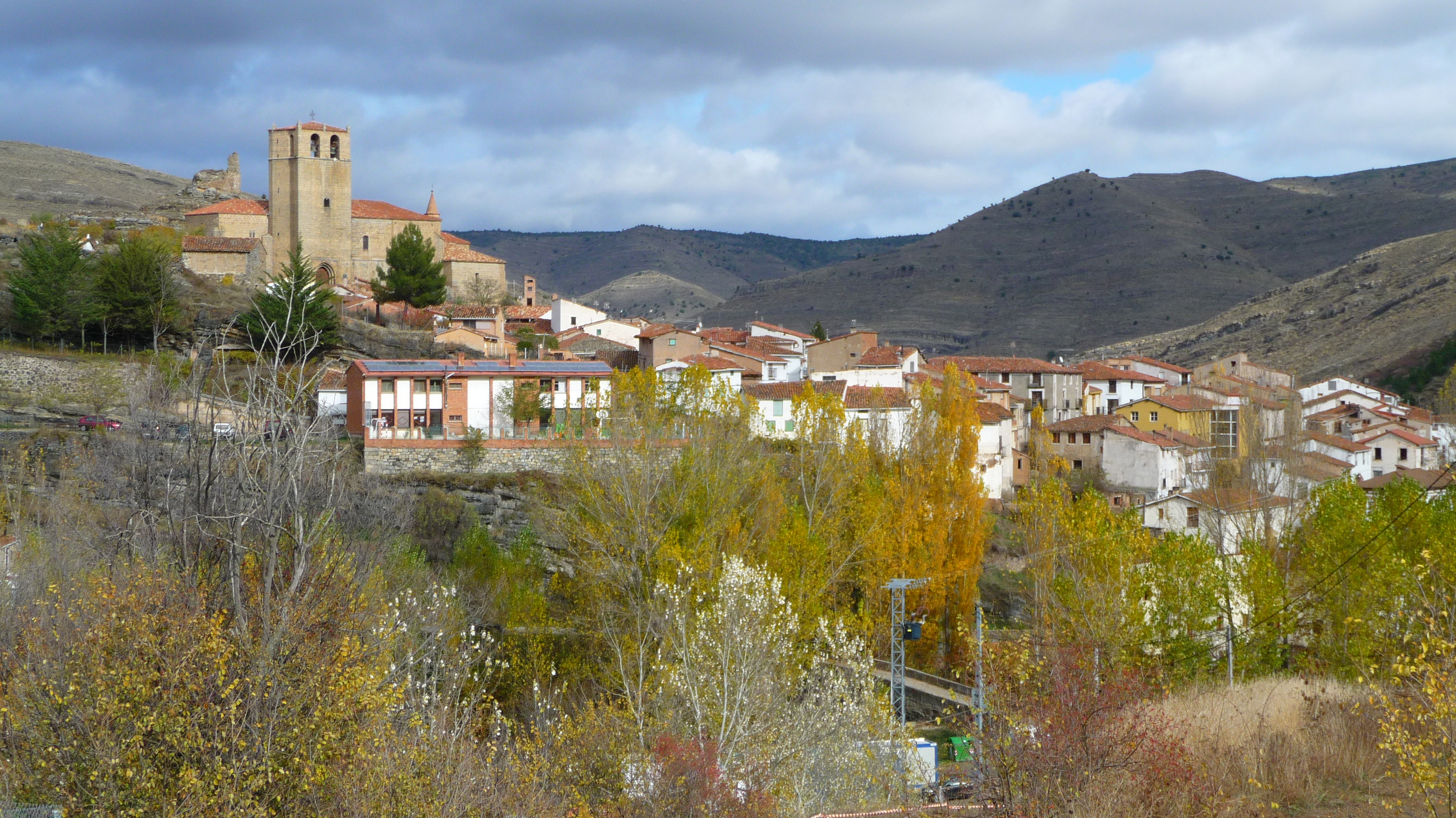 Vista de Enciso, en La Rioja (España)